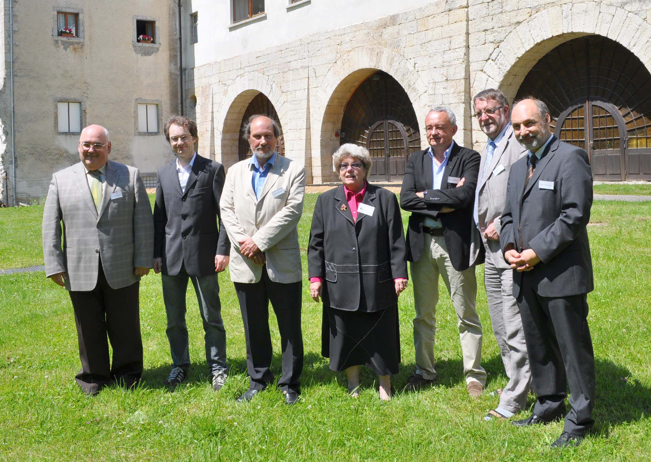 Comité trinational 2012-2014 du Réseau des Sociétés d’Histoire du Rhin supérieur